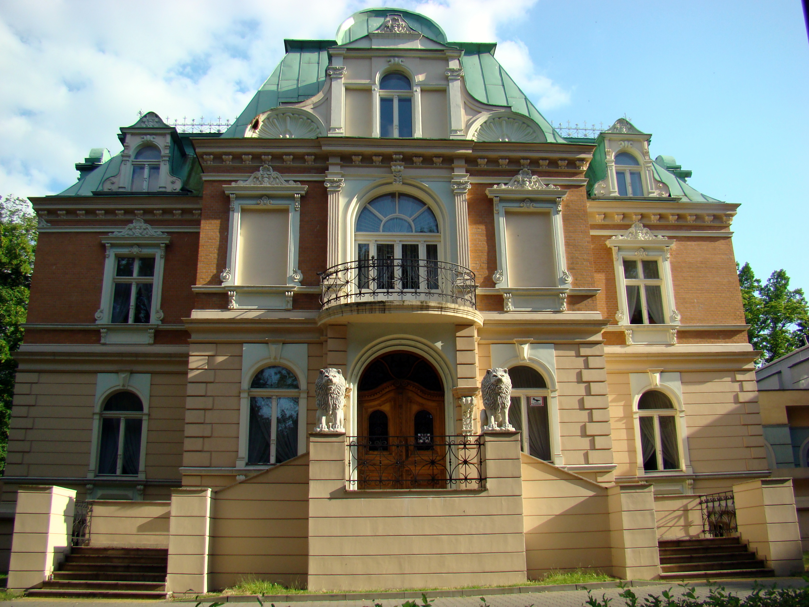 Front budynku Młodzieżowego Domu Kultury w Częstochowie, dawna willa właściciela huty "Częstochowa", Bernarda Hantkego. Zbudowana w latach 1900-1903